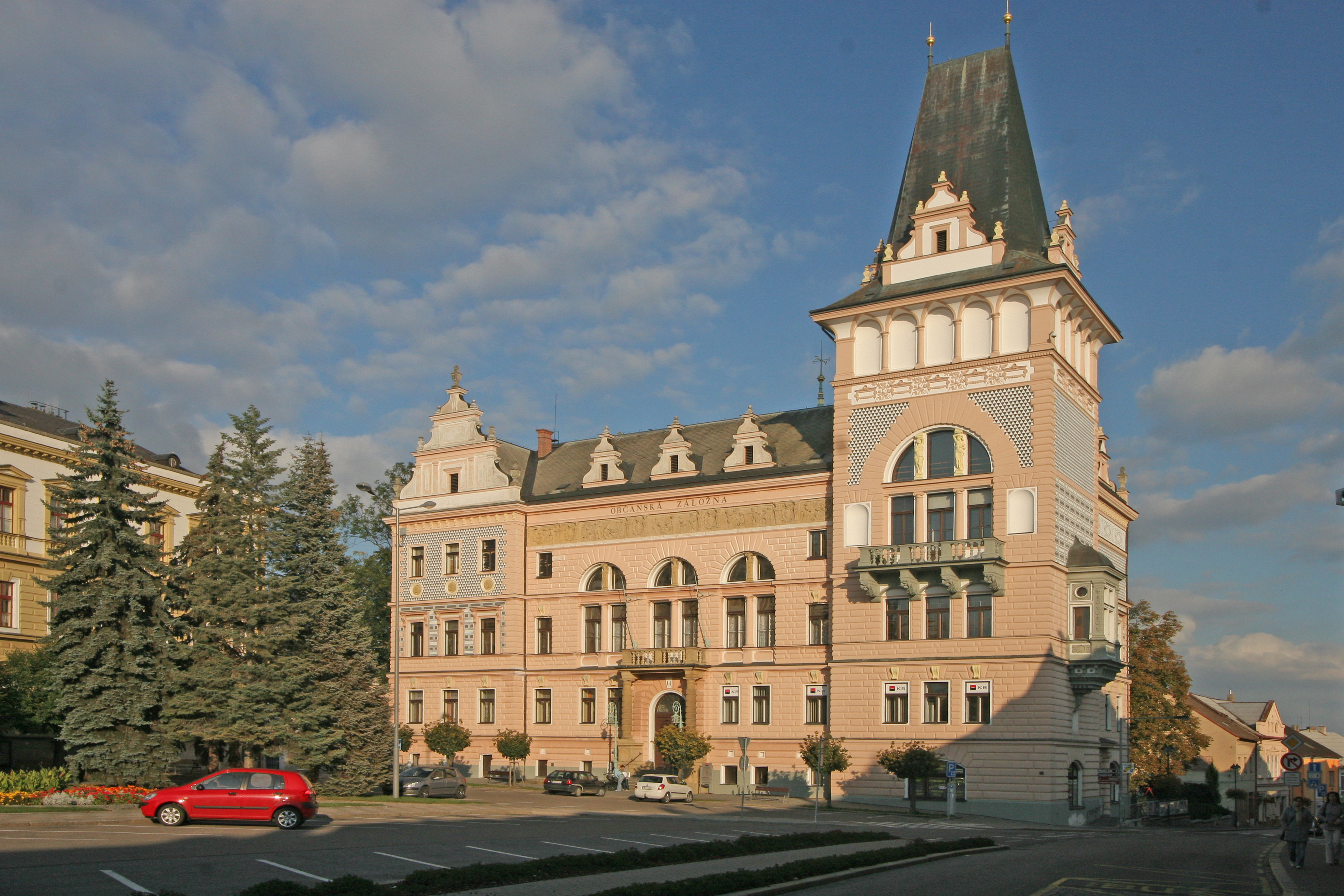 Záložna (Přelouč), Masarykovo nám. 44, Přelouč